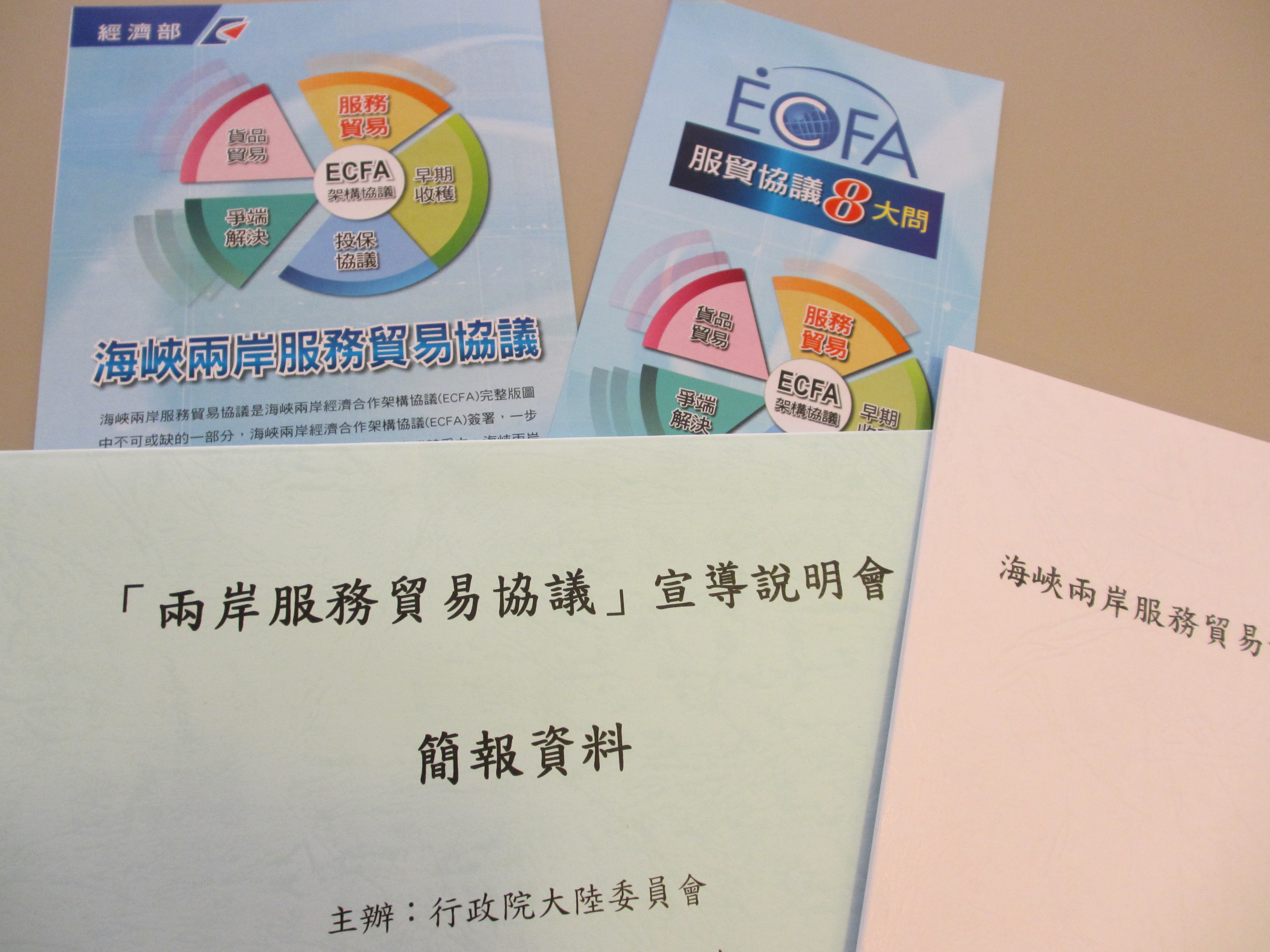 中文（台灣）: 中華民國經濟部與行政院大陸委員會印製的海峽兩岸服務貿易協議宣傳手冊。